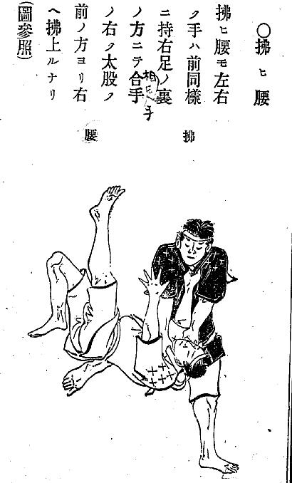 ○拂ヒ腰 拂ヒ腰モ左右ノ手ハ前同樣ニ持右足ノ裏ノ方ニテ合手ノ右ノ太股ノ前ノ方ヨリ右ヘ拂上ルナリ（圖參照）